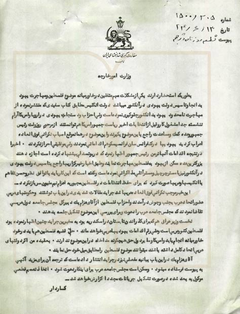 نامه‌ای از کاردار ایران در قاهره در تاریخ ۱۳ شهریور ۱۳۲۴ هجری خورشیدی، به شماره سند ۱۱۲۰۶ - ۱۰۲۰۱۱ مبنی بر خبر همکاری برخی کشورهای عرب خاورمیانه و کشورهای اروپایی و آمریکایی برای تاسیس اسرائیل.